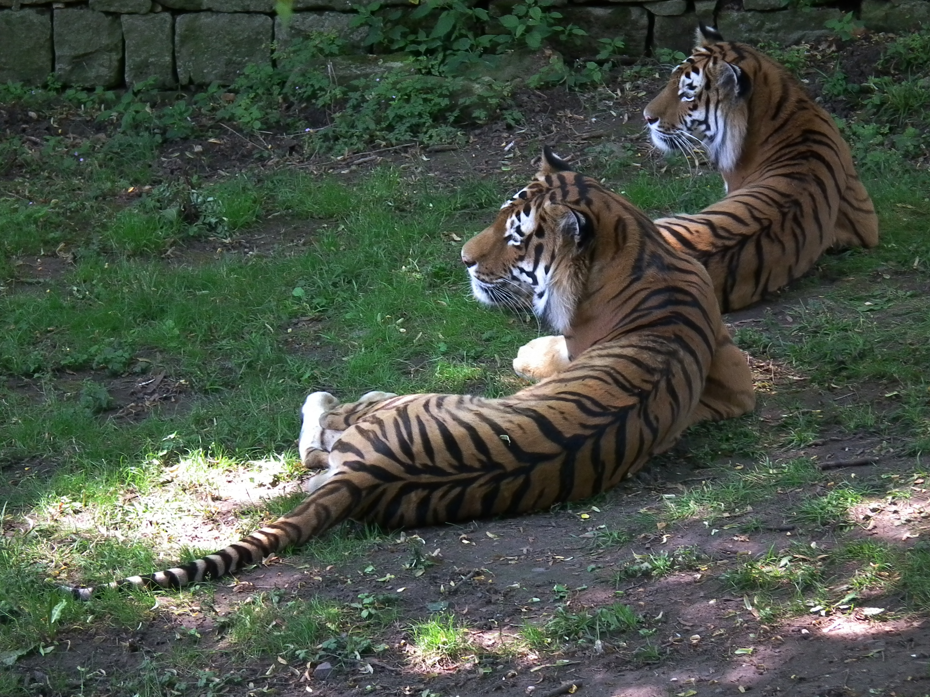 Sibirischer Tiger (Panthera tigris altaica), fotografiert im Zoo Landau (Rheinland-Pfalz, Deutschland)